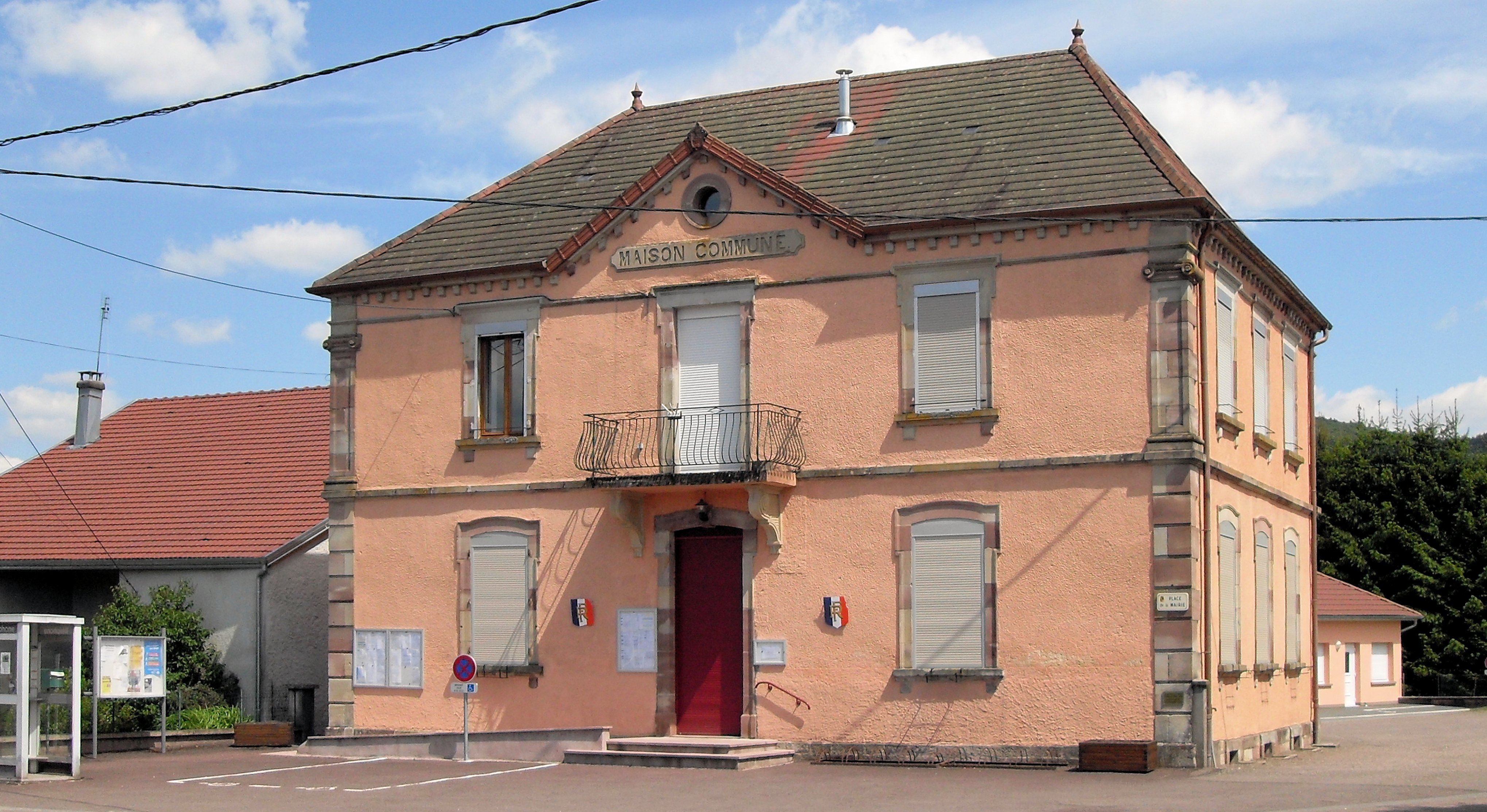 La mairie de Saint-Barthélemy